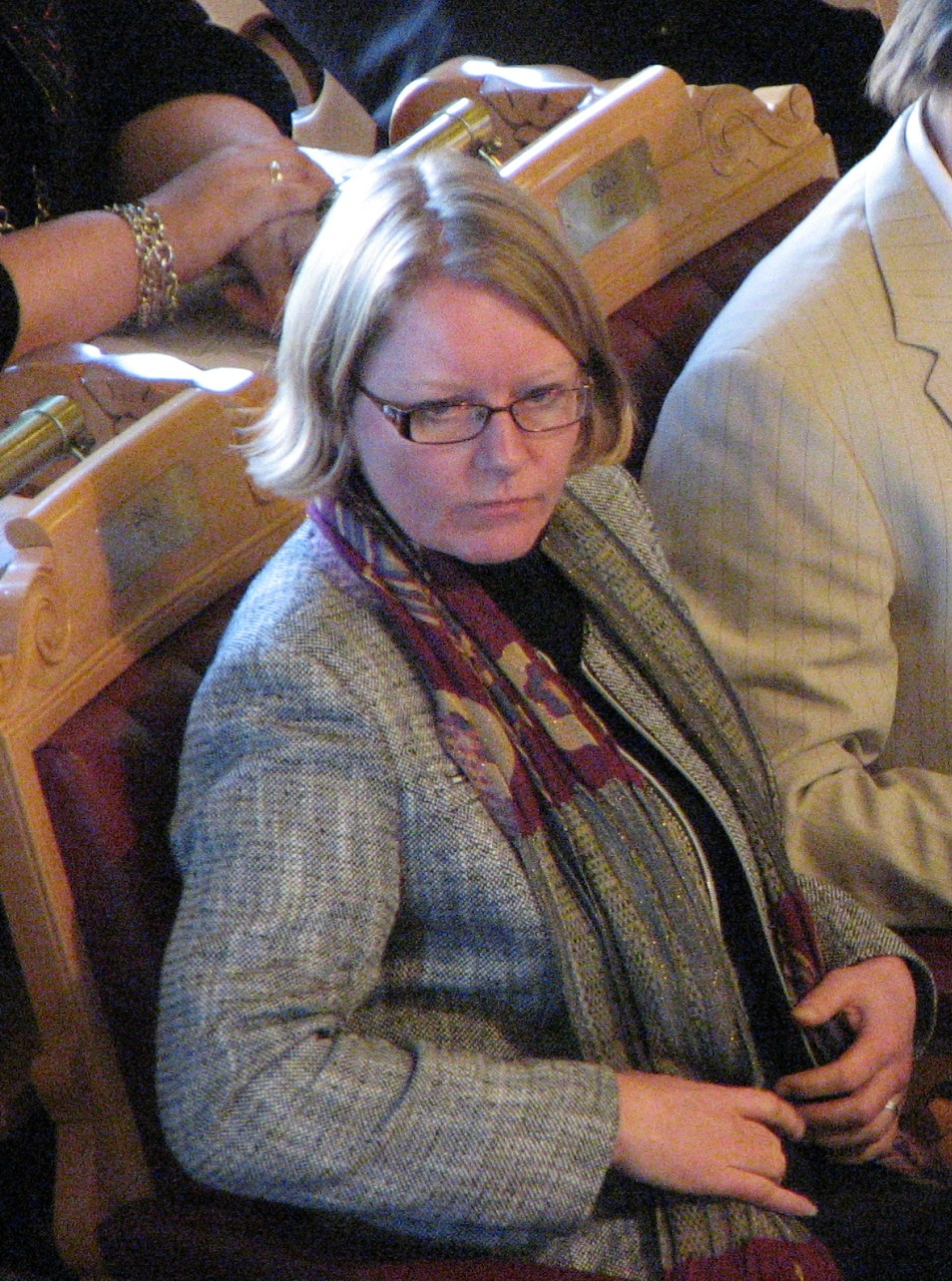 Stortingsrepresentant Ingunn Gjerstad (vara for Hekki Holmås) (Stortinget.no) for Oslo SV i Stortinget 12. februar 2009. Beskjært for et større bilde.